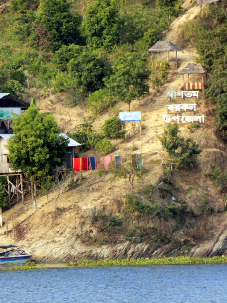 কাপ্তাই লেক,রাঙ্গামাটি